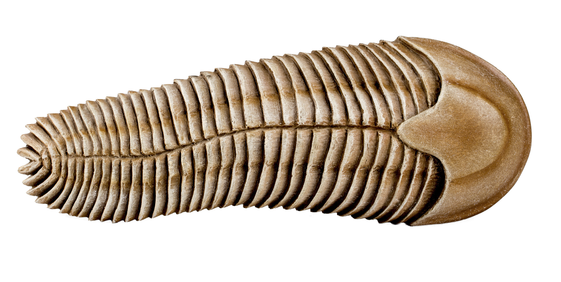 Ricostruzione in scala 5:1.